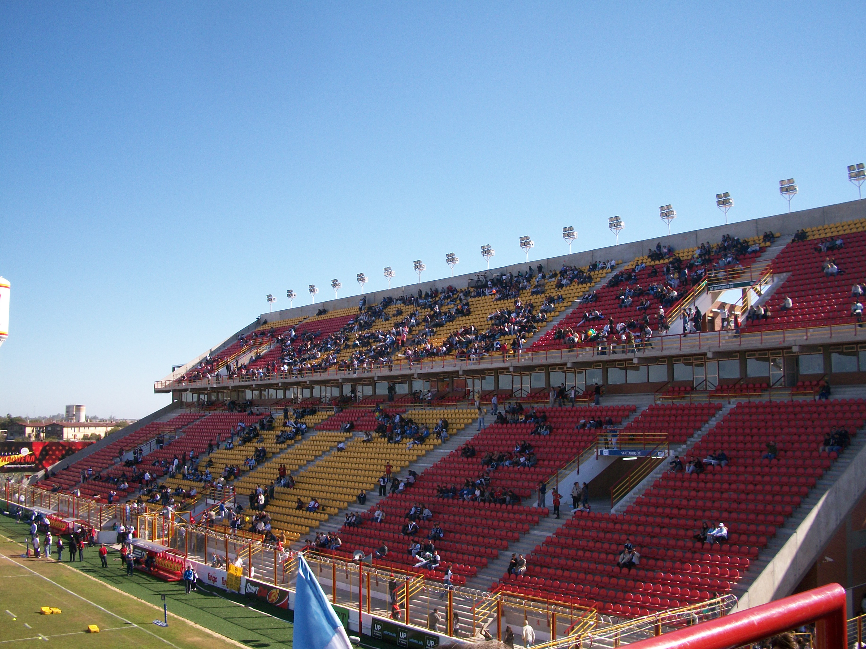 Platea alta y baja del estadio centenario